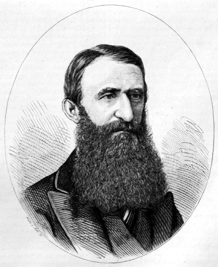 Duka Tivadar (1825–1908) honvéd százados, brit őrnagy, orvos, az MTA tagja. Pollák Zsigmond metszete